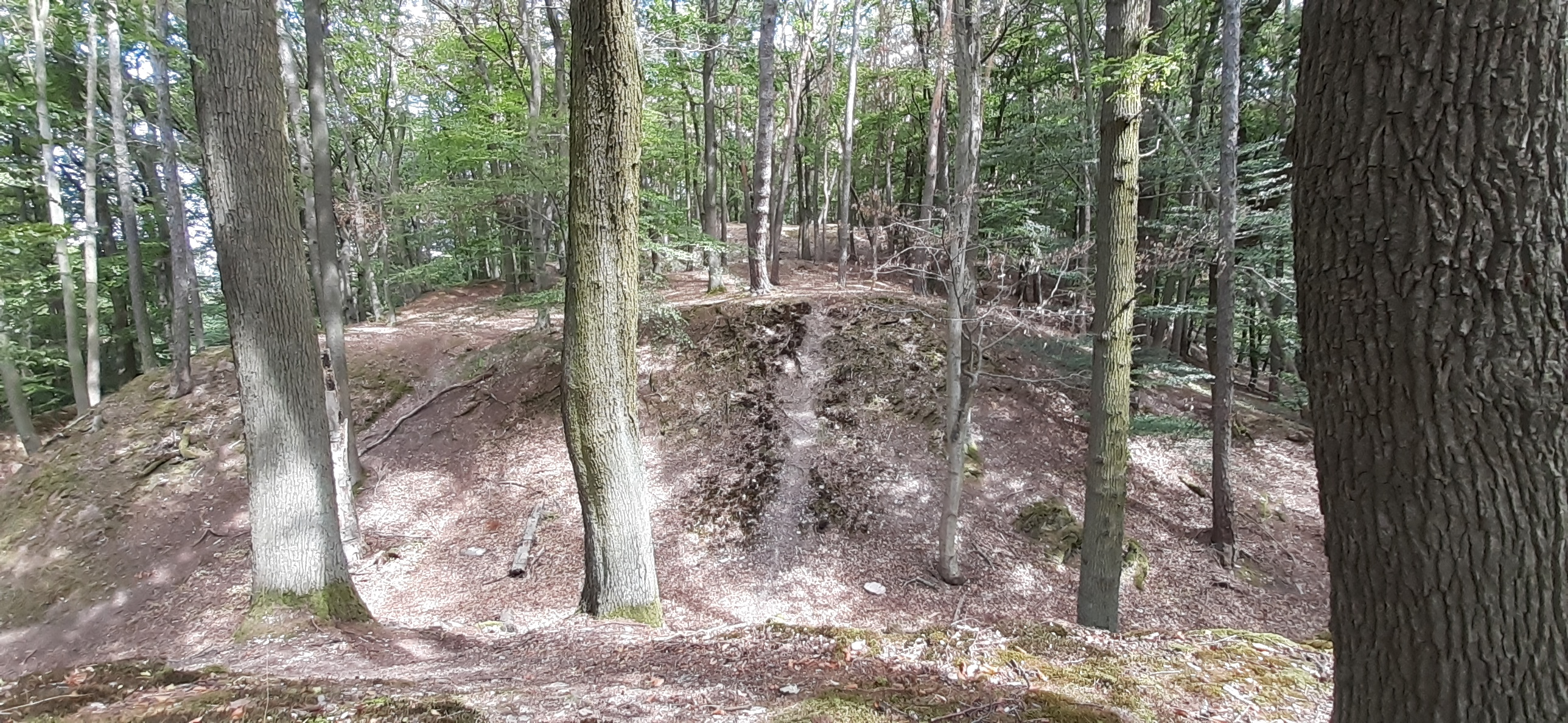 Rannenburg:Blick auf die Vorburgen nach Norden